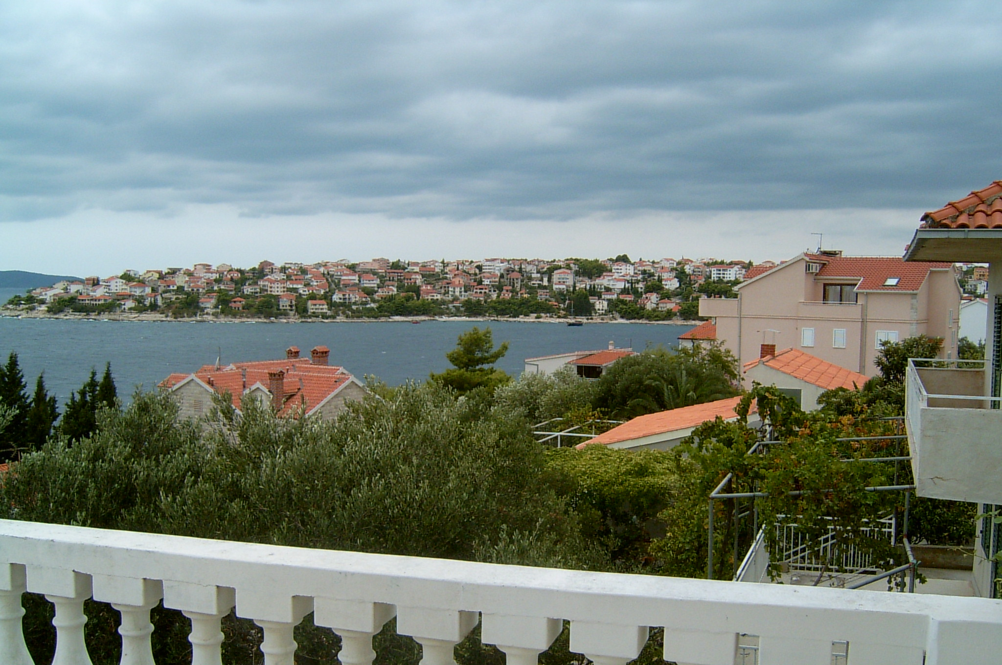 Chorwacja, Gornij Okrog na wyspie Ciovo